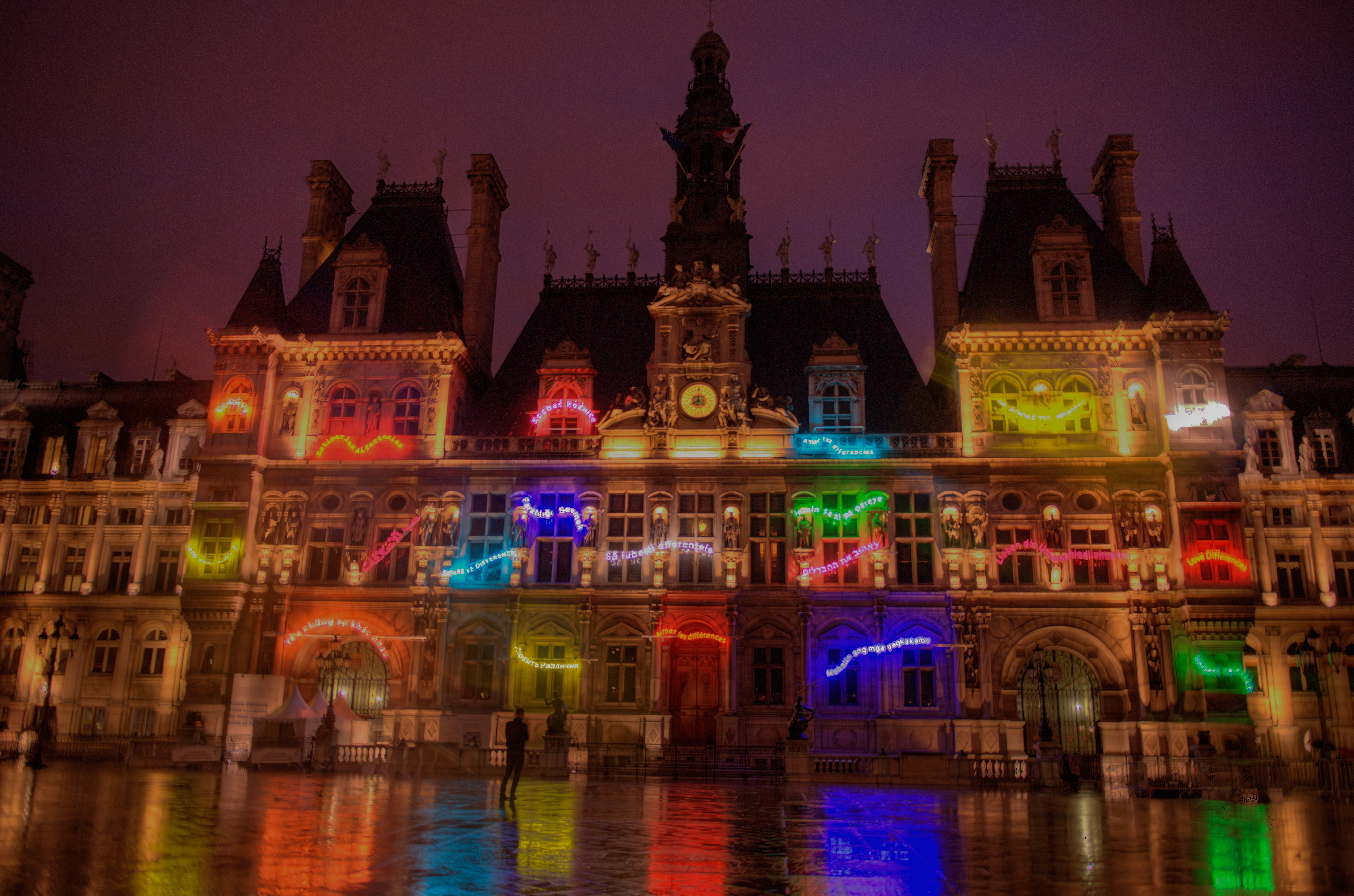 Hôtel de Ville de Paris - Nuit blanche 2010